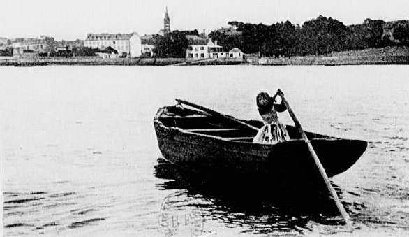 Bénodet au début du XXème siècle